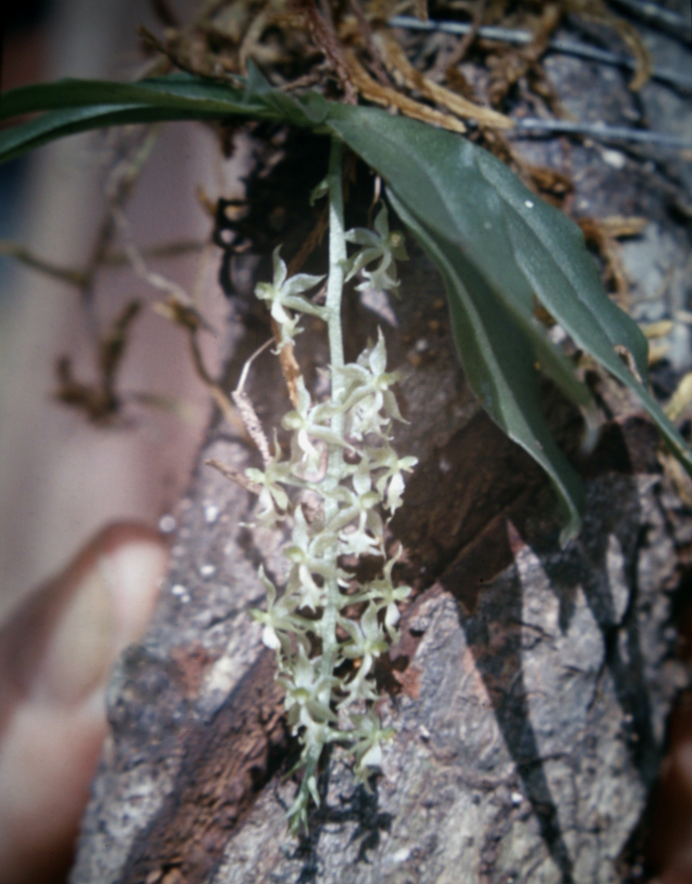 Cryptarrhena lunata. Suriname.